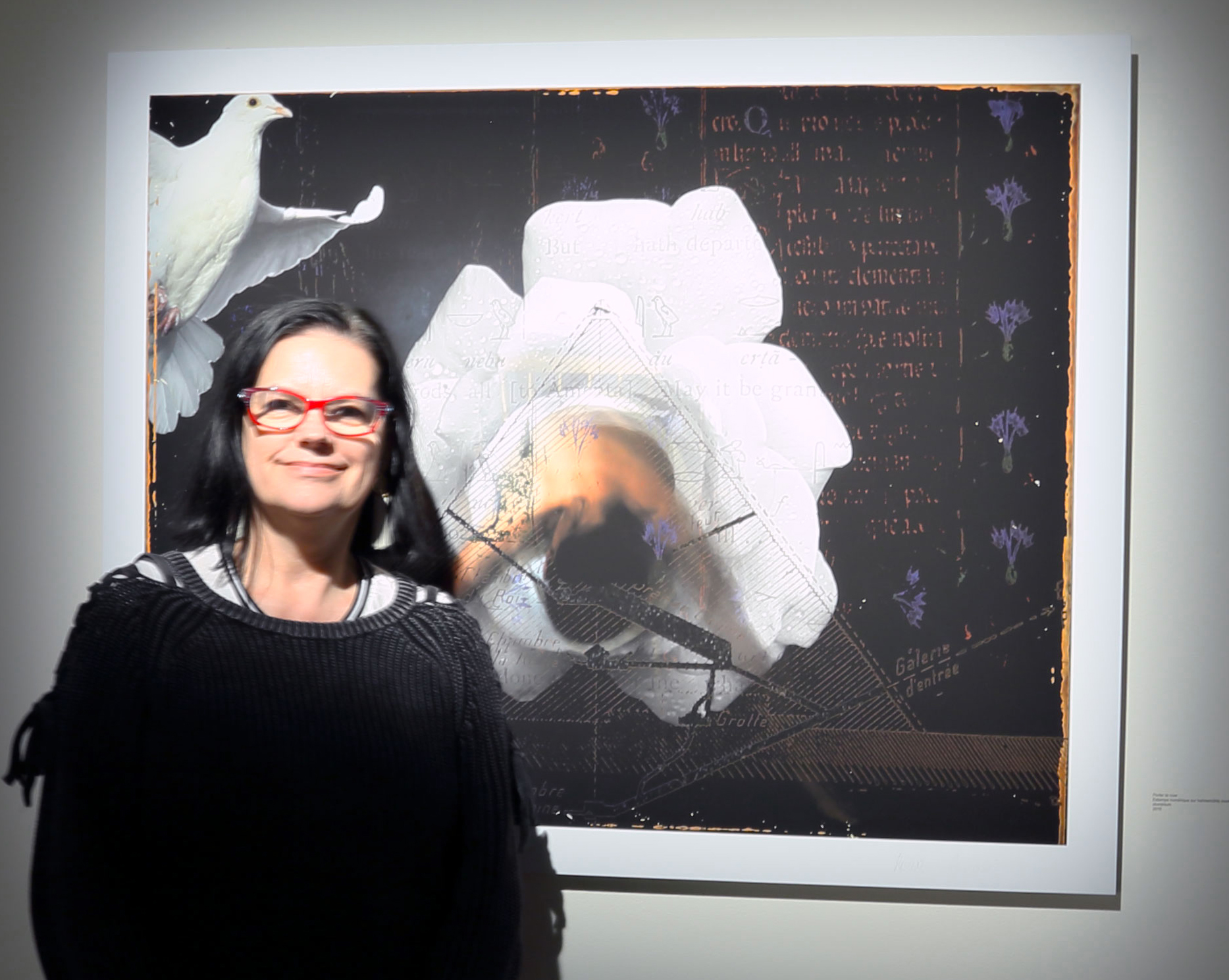 Portrait de l'artiste lors de son vernissage de l'exposition : Journal alternatif II ou les cahiers d'Ishtar